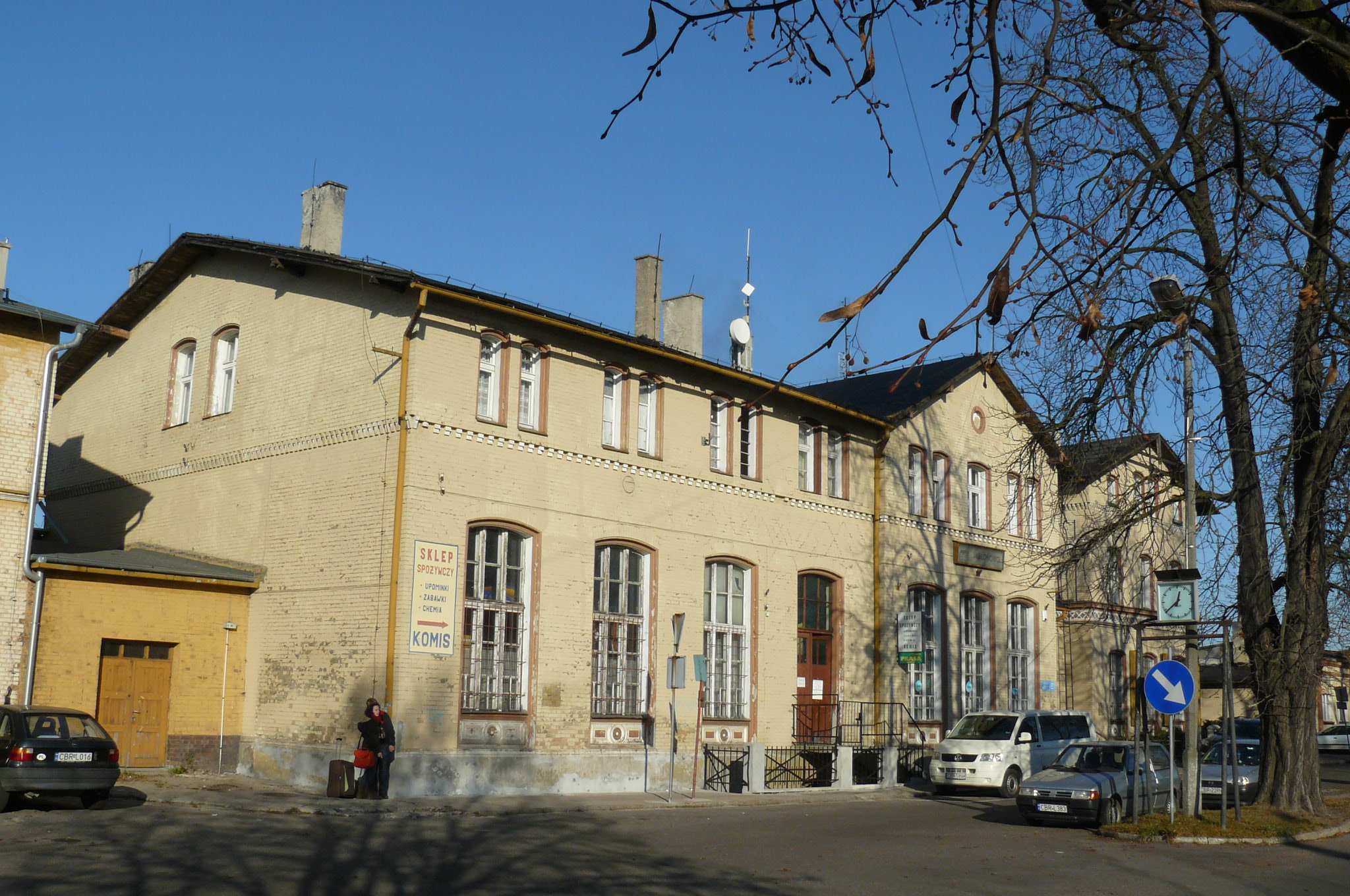 Jabłonowo Pomorskie, train station.